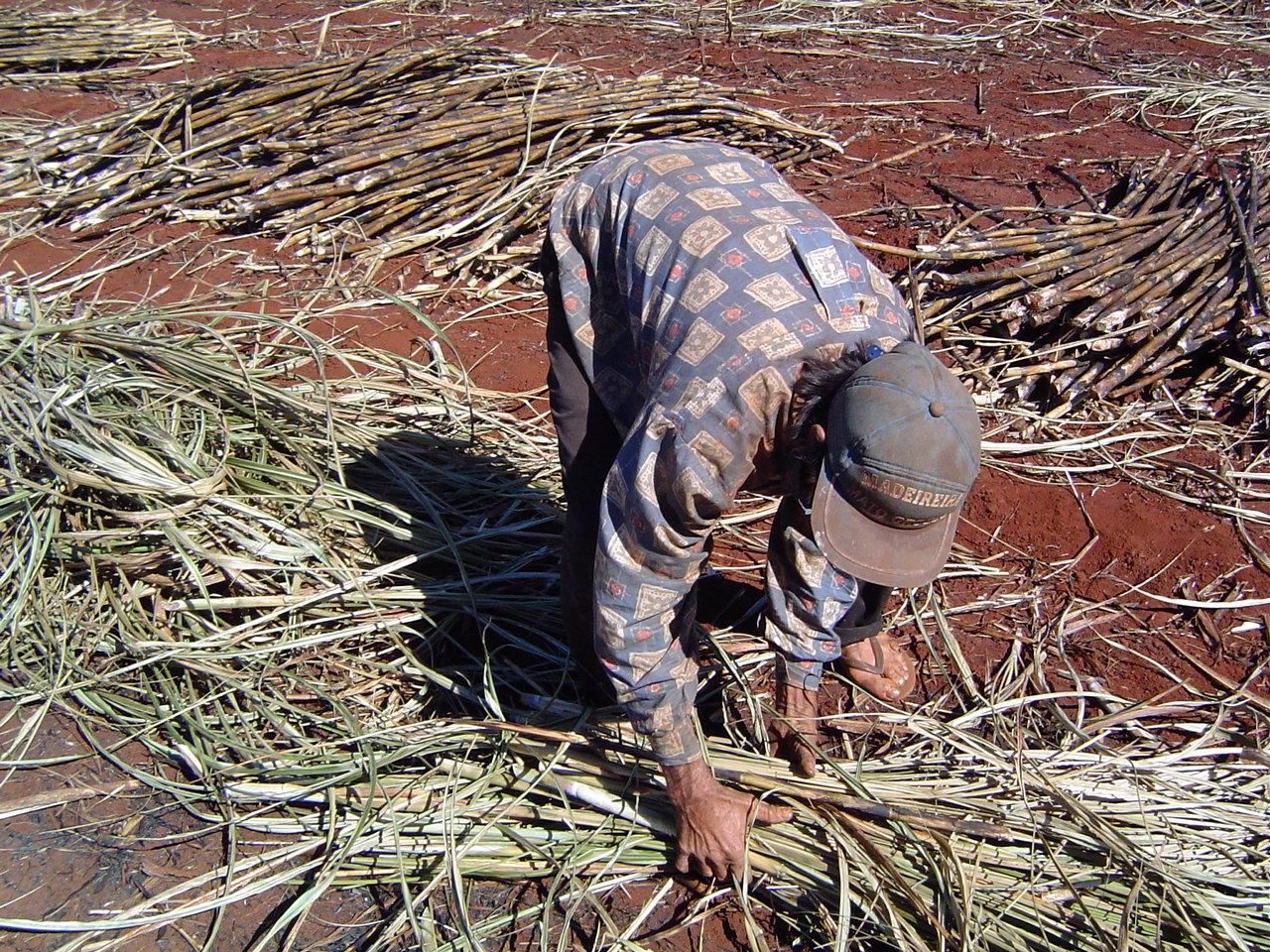 típico trabalhador empregado no corte da cana-de-açúcar, no interior de São Paulo - Brasil